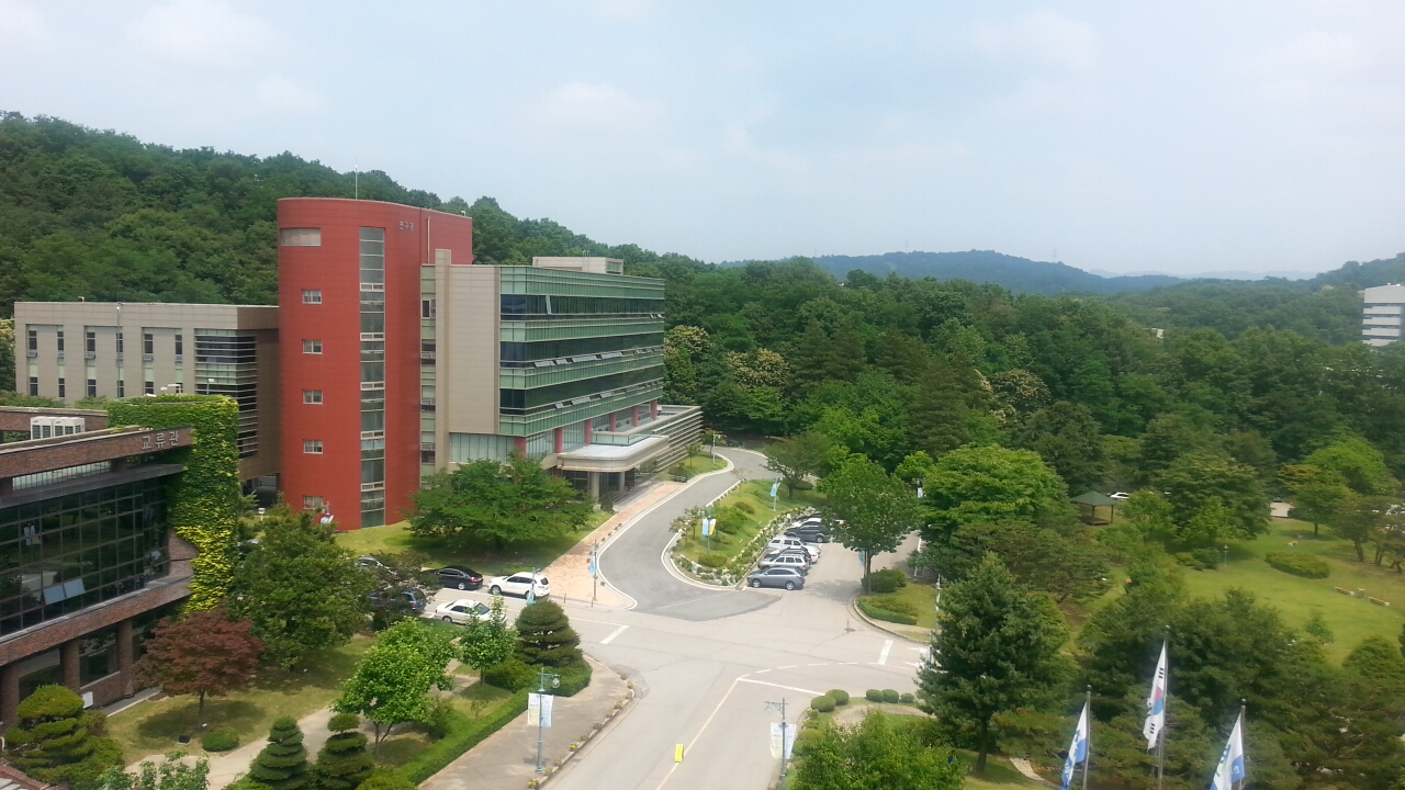 한국연구재단 대전 청사 연구관 전경사진(2014.6.10 촬영)